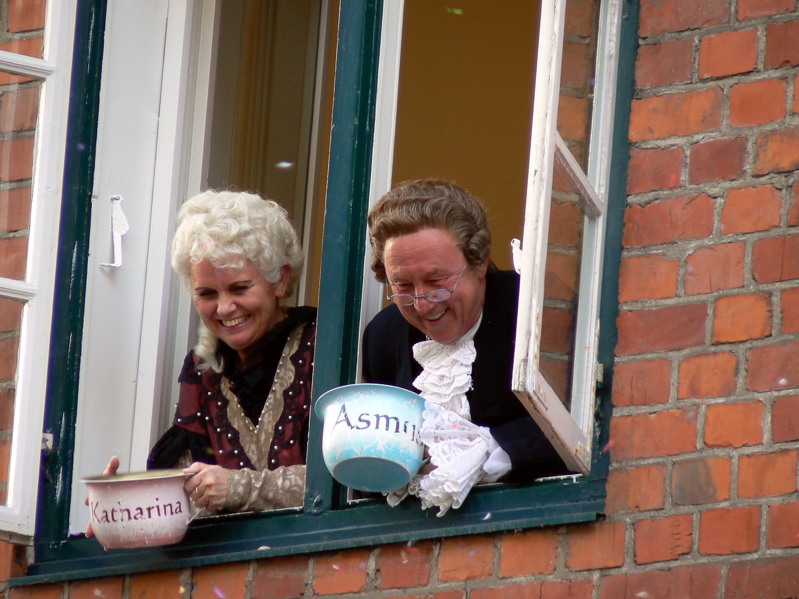 Die Hauptfiguren des Kieler Umschlags: Asmus Bremer und seine Frau Katharina nach dem Wecken im Warleberger Hof.